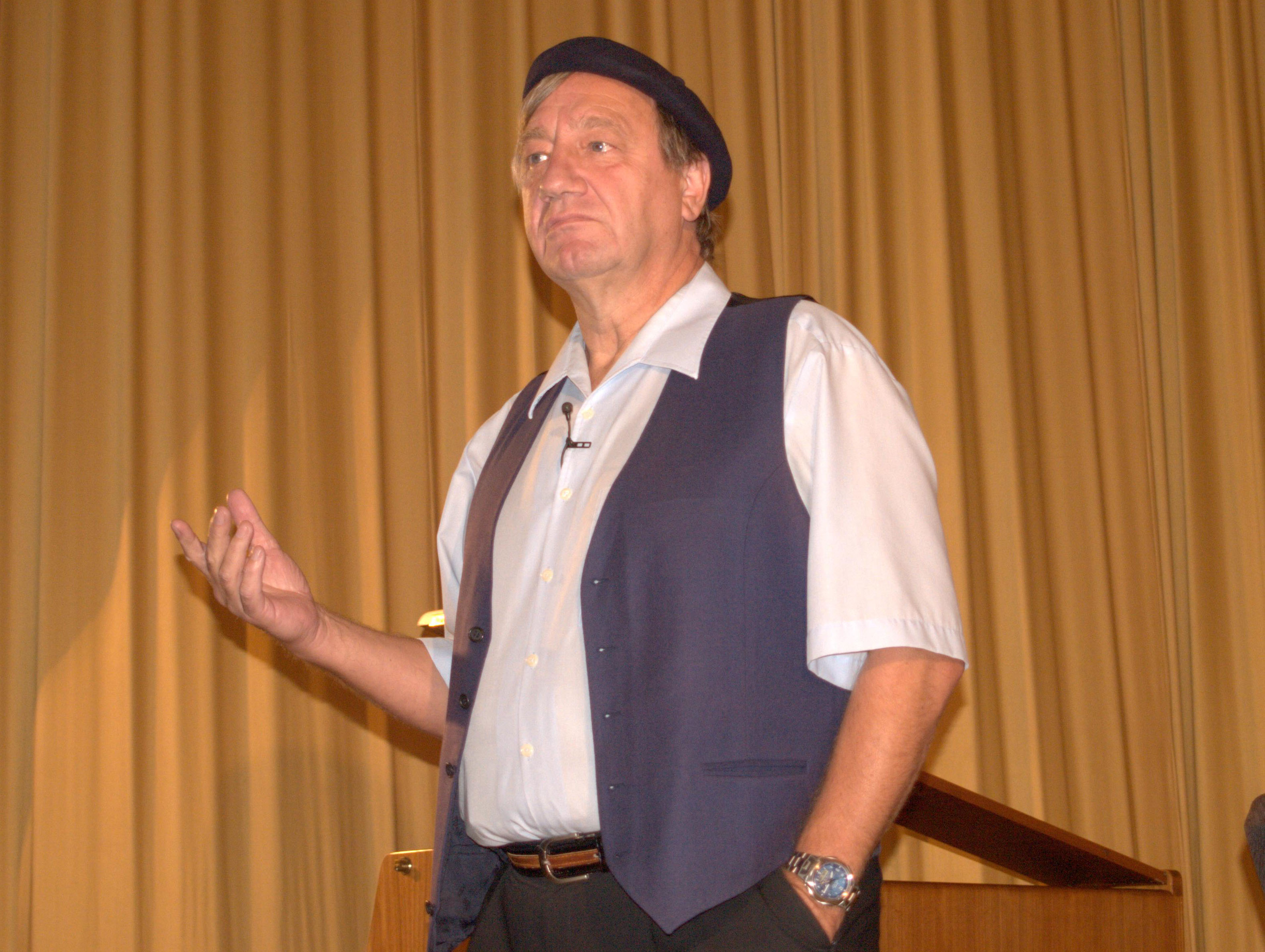 Detlev Schönauer, German cabaret artist